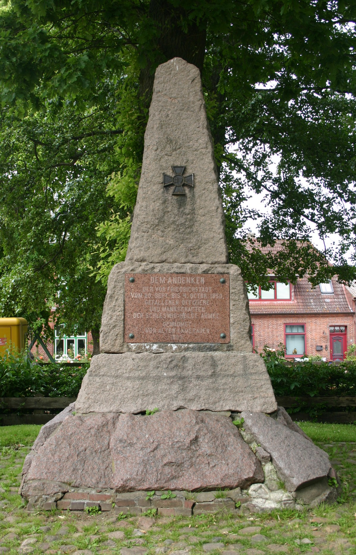 Gedenkstein für im Schleswig-Holsteiner Krieg 1850 gefallener Soldaten